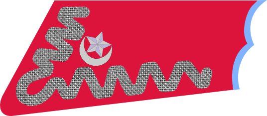 Łapka jazdy tatarskiej na kołnierz kurtki (1919) - II RP